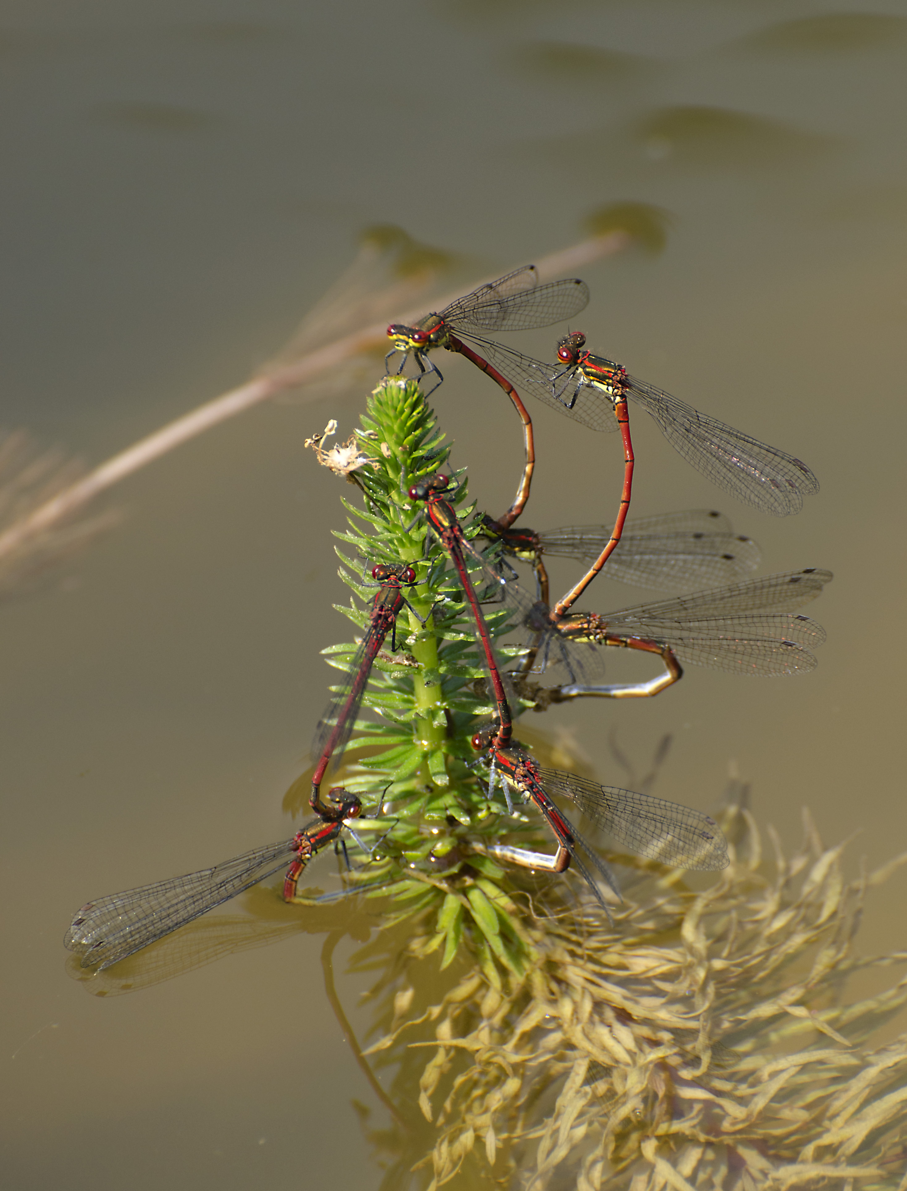 Frühe Adonislibelle (Pyrrhosoma nymphula), aufgenommen bei Stuttgart